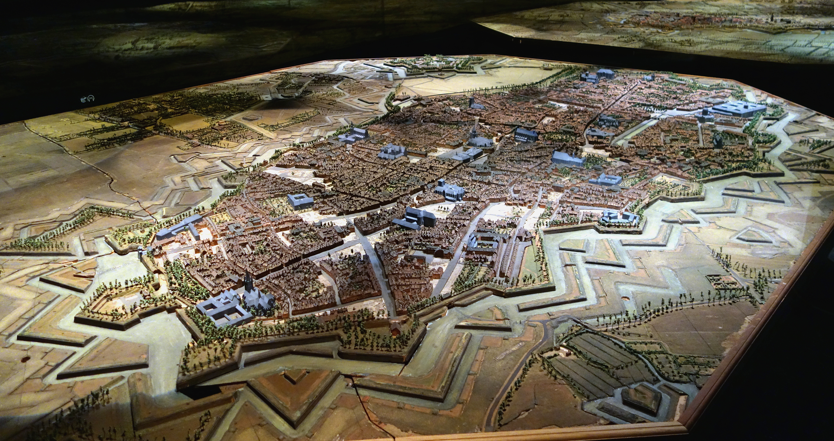 Plan-relief de Lille au Palais des beaux-arts de Lille.